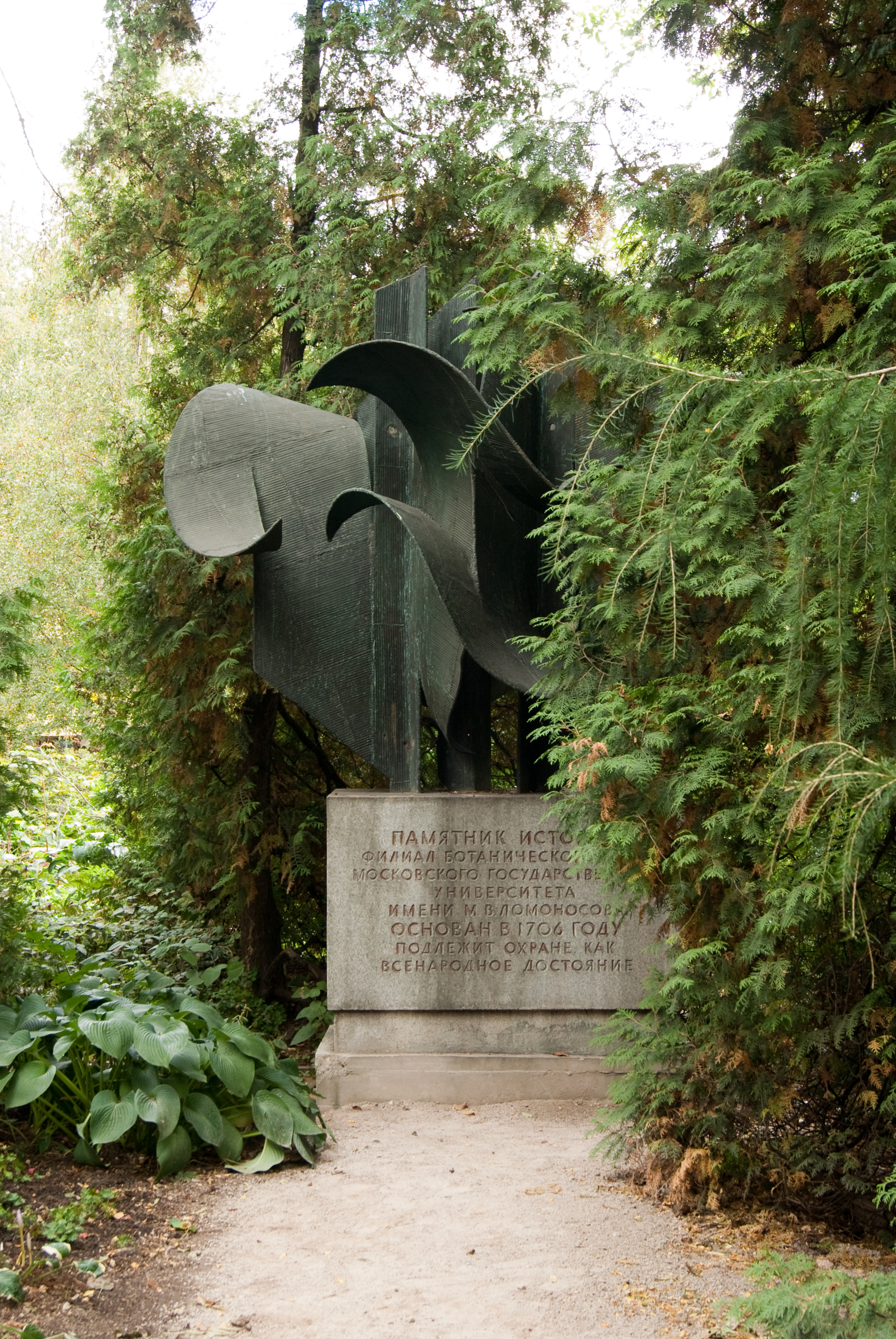 Aptekarsky Ogorod